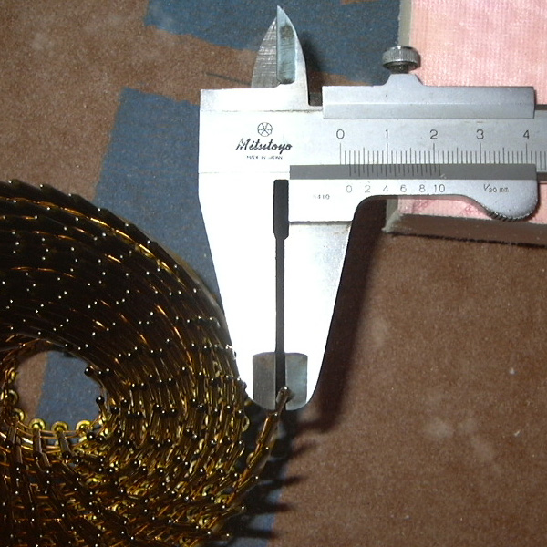 欠陥住宅_木造_釘_01